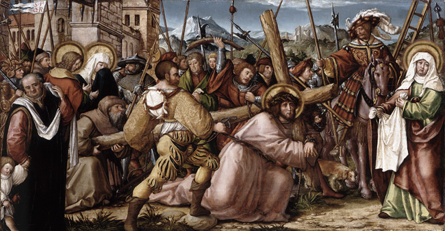 Kreuztragung Christi - Dornenkrönung